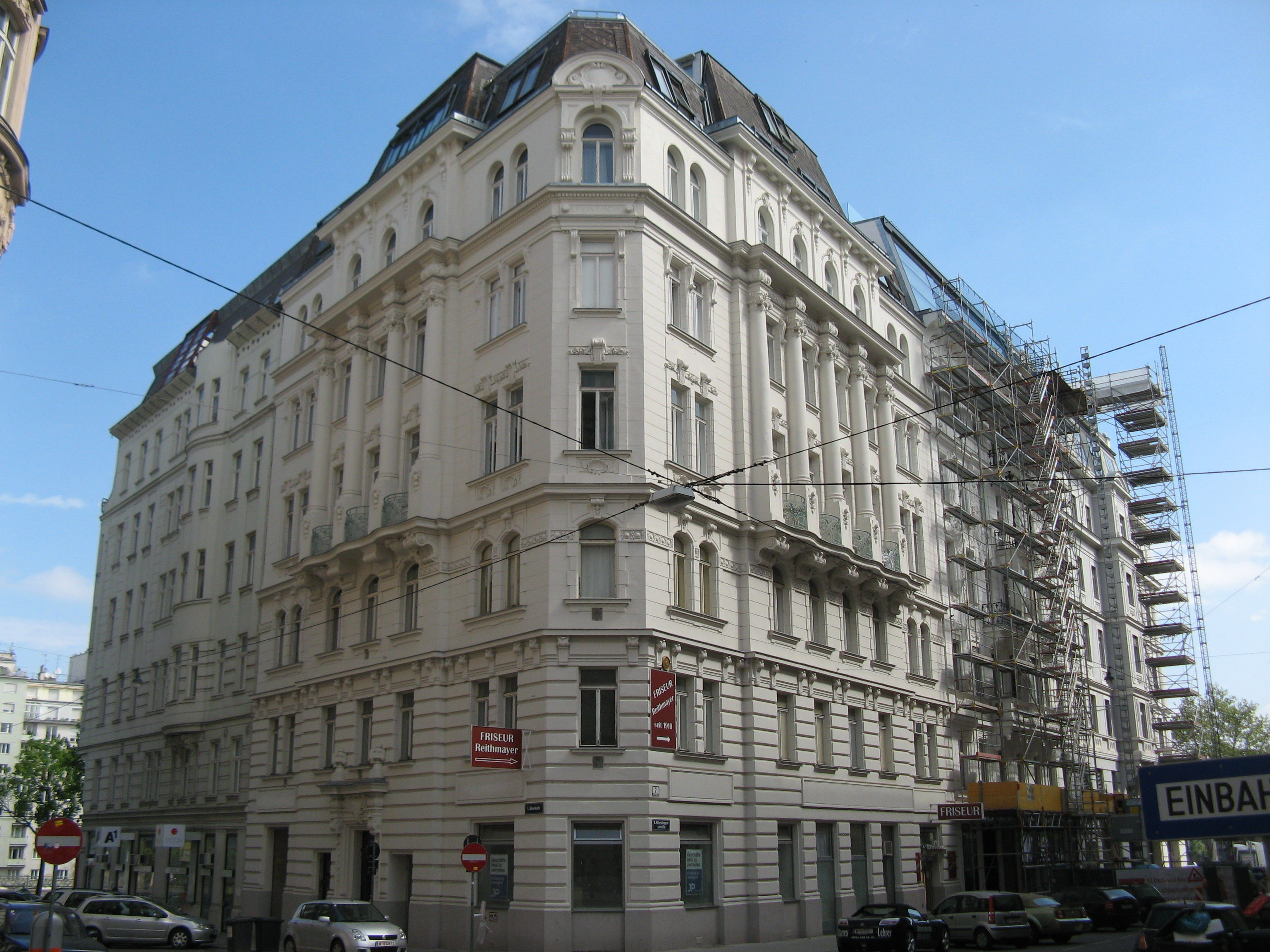 Haus Biberstraße Nr. 26 (1903) von Leopold Fuchs, Wien-Innere Stadt